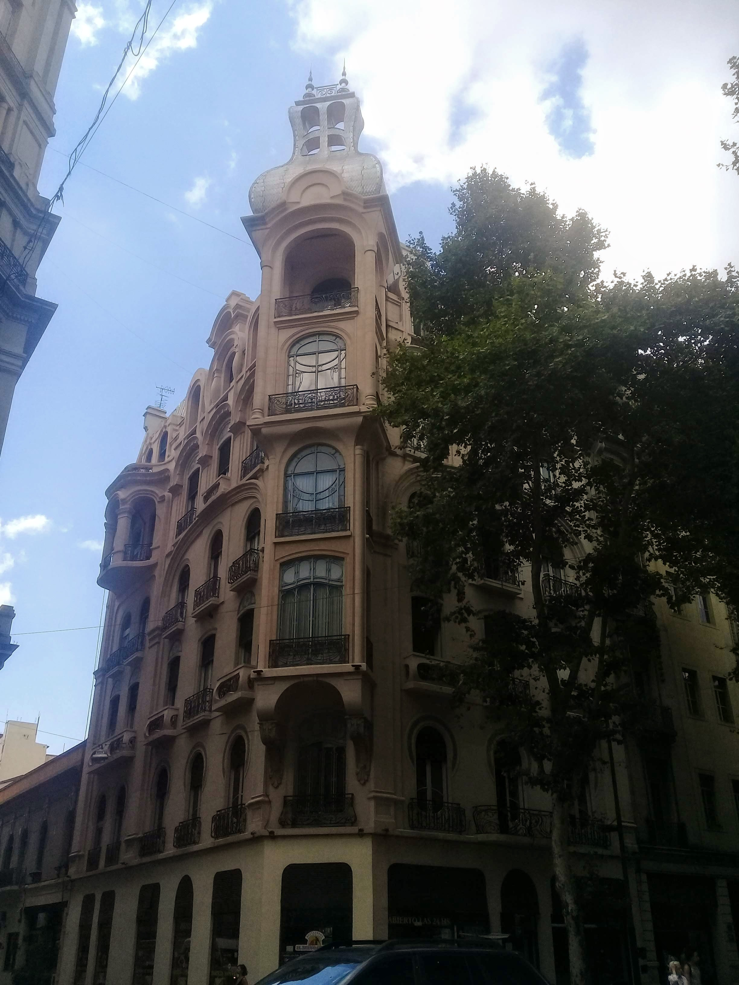 Vista del Hotel Chile con la cúpula restaurada en enero de 2019